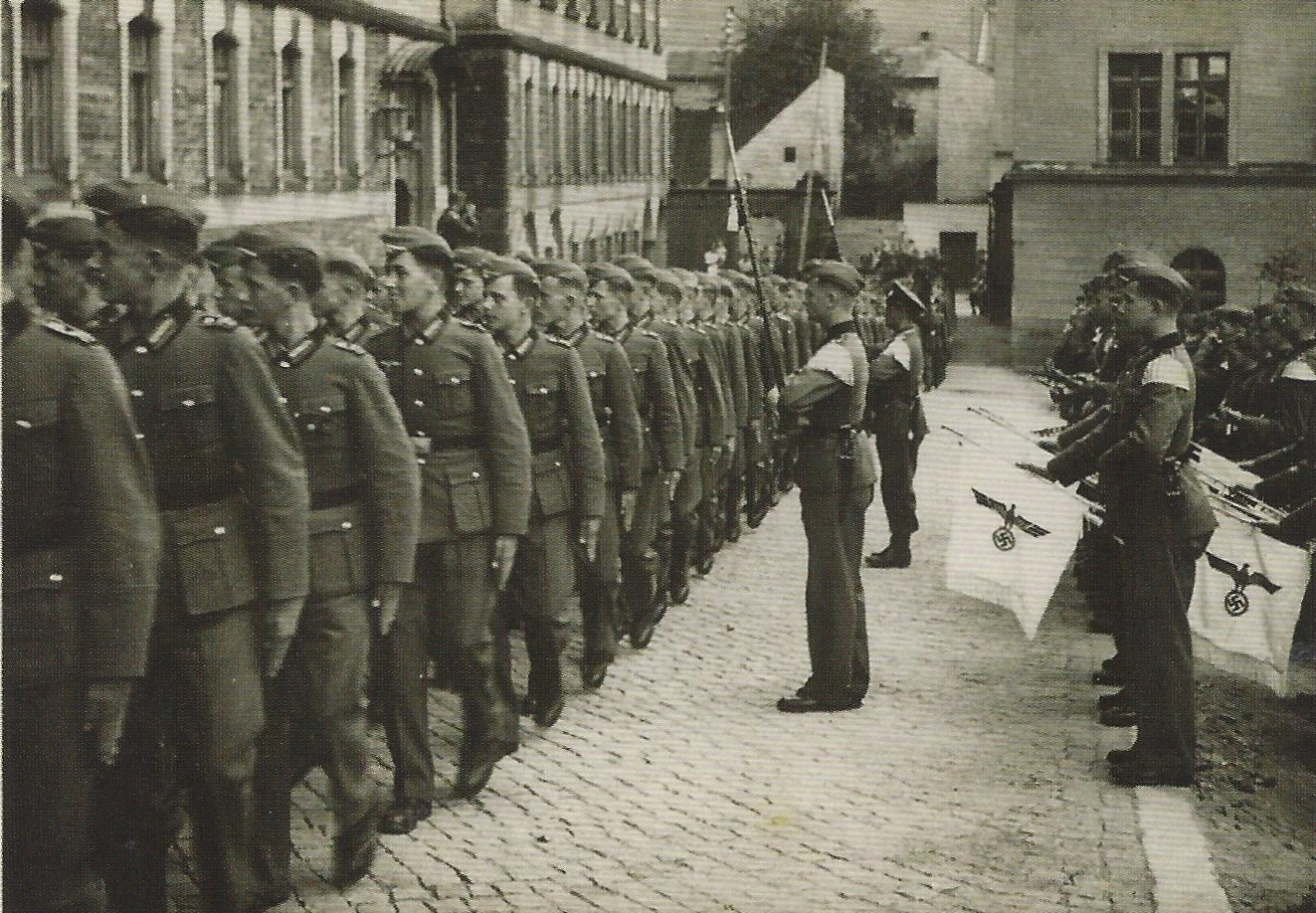 Königliche Unteroffizierschule in Marienberg.